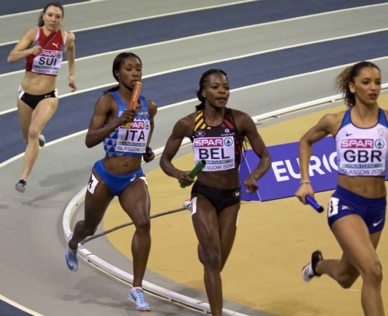 EKI30684 4x400m dames bolingo